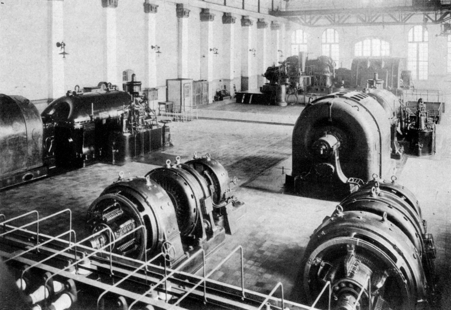 安治川東発電所設置の発電機